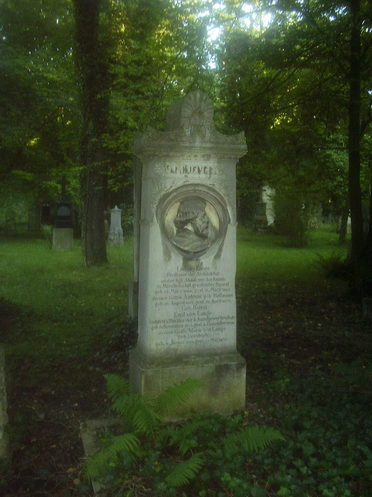 Grab von Ludwig Lange (* 22. März 1808 in Darmstadt; † 31. März 1868), deutscher Architekt und Maler